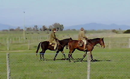 Butteri nella pianura maremmana presso Alberese (GR)